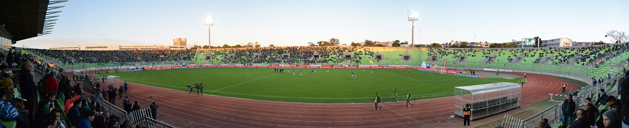 Panorámica del Estadio Elías Figueroa Brander, Valparaíso, Chile, en el entretiempo de Santiago Wanderers v Deportes Antofagasta, 24-04-2016.